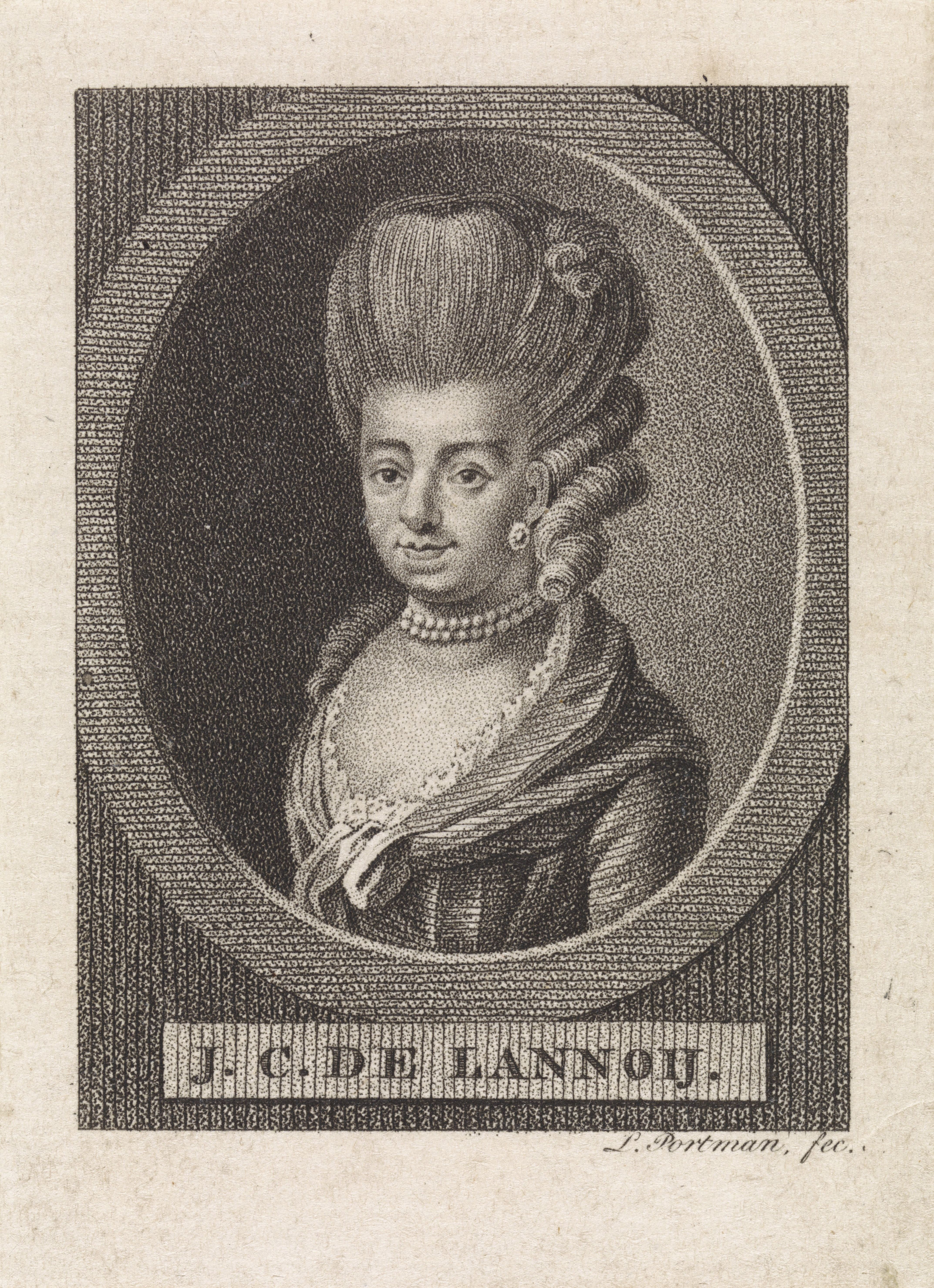 IdentificatieTitel(s): Portret van de dichteres Juliana Cornelia de LannoyObjecttype: prent Objectnummer: RP-P-1906-1068Catalogusreferentie: Van Someren 31502(2)Opmerking: staat bepaald aan de hand van aanwezige prenten in RijksprentenkabinetOpschriften / Merken: verzamelaarsmerk, verso, gestempeld: Lugt 2228VervaardigingVervaardiger: prentmaker: Ludwig Gottlieb Portman (vermeld op object)Plaats vervaardiging: onbekendDatering: 1787 - 1828Fysieke kenmerken: stippelets en etsMateriaal: papier Techniek: stippelets / etsenAfmetingen: blad: h 92 mm × b 67 mmOnderwerpWie: Juliana Cornelia de LannoyVerwerving en rechtenVerwerving: aankoop 1906Copyright: Publiek domein